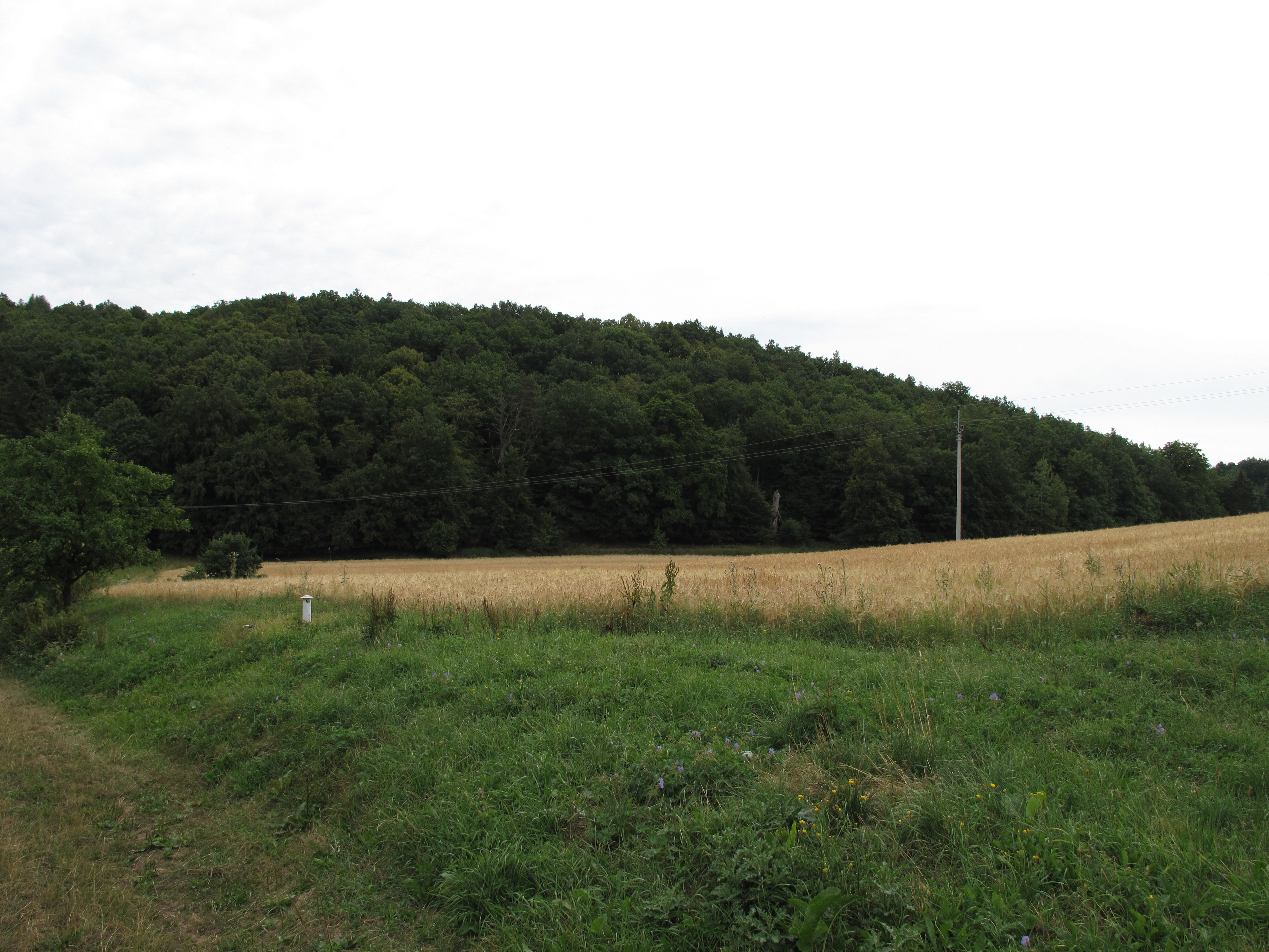 Přírodní památka Osojno. Okres Plzeň-sever, Česká republika.